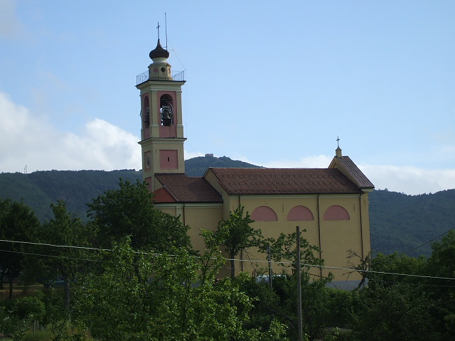 Chiesa di San Martino a Dova Superiore di Cabella Ligure in val Gordenella (AL)